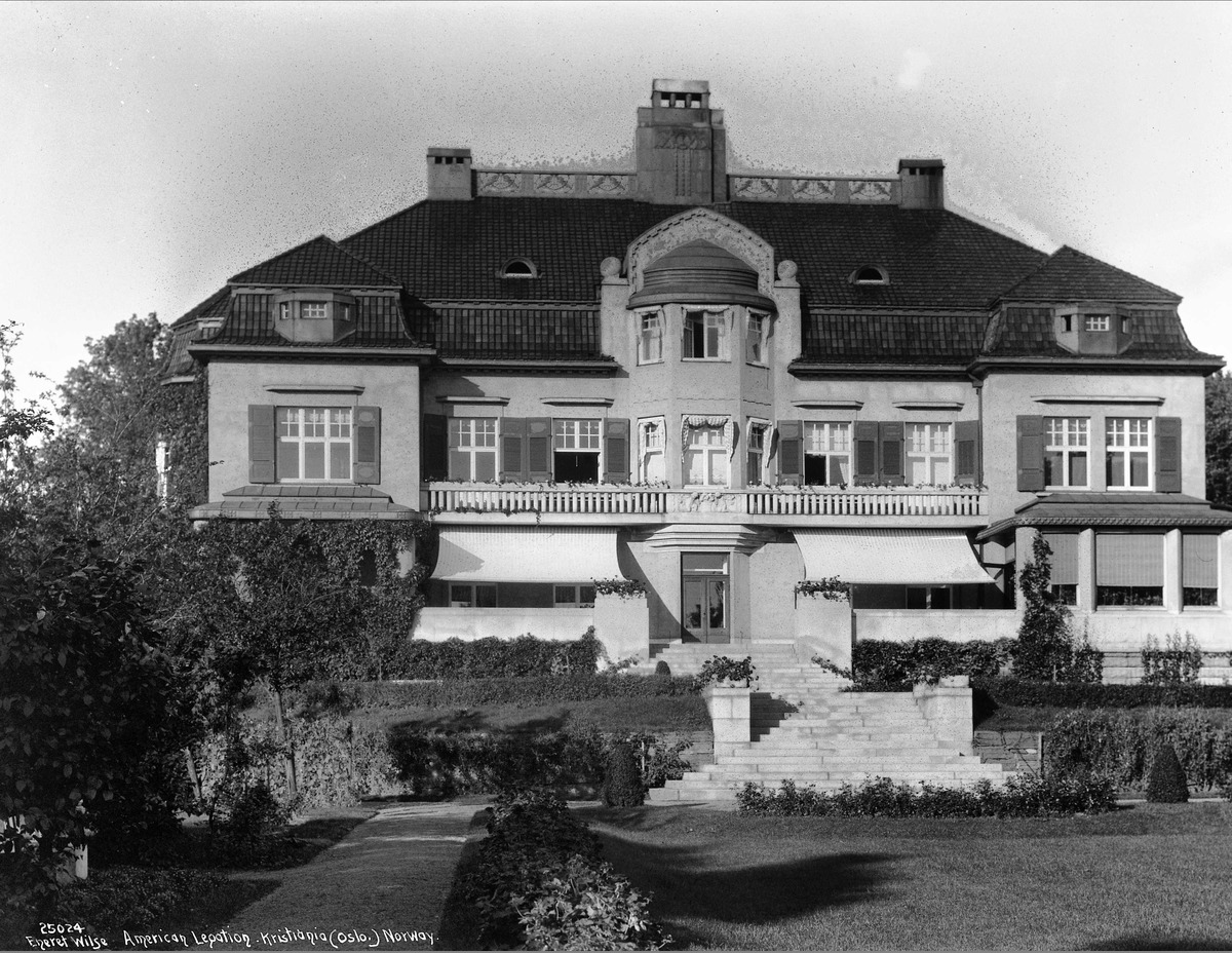 De forente Staters ambassadørbolig, Villa Otium i Nobels gate 28, Oslo, markiser, hage, terrasser, trapp.